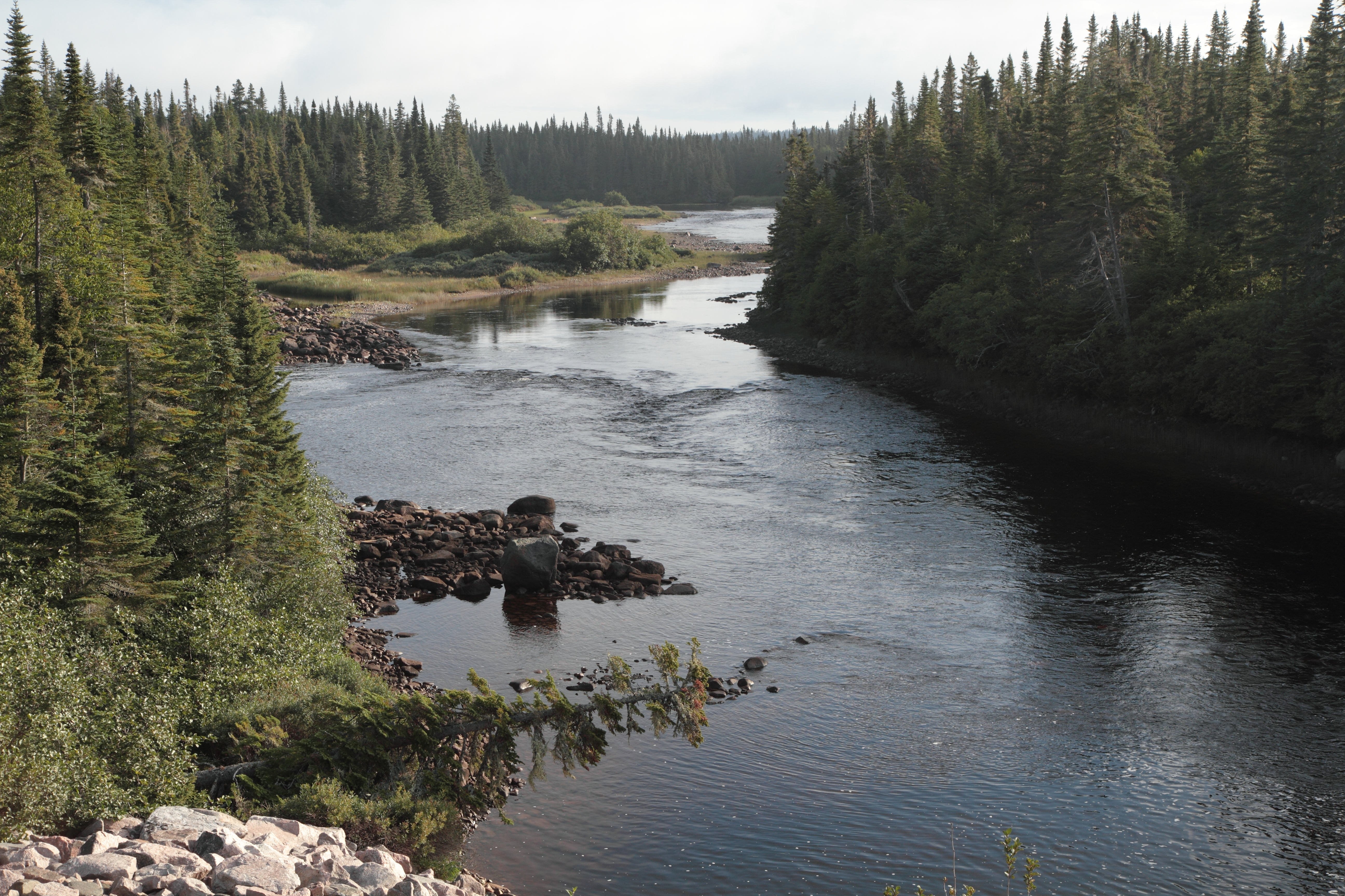 Rivière de la Corneille, Baie-Johan-Beetz, Québec, Canada